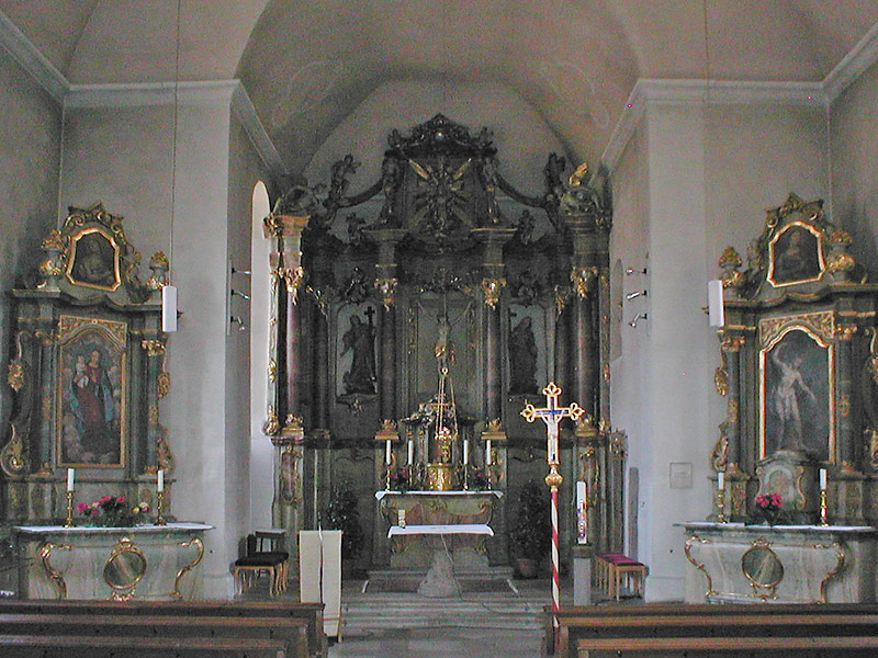 Inneres der kath. Kirche in Bad Rappenau-Grombach